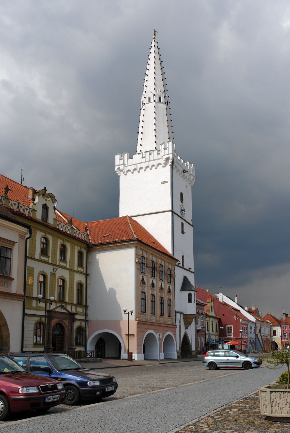 Kadaň Rathausturm